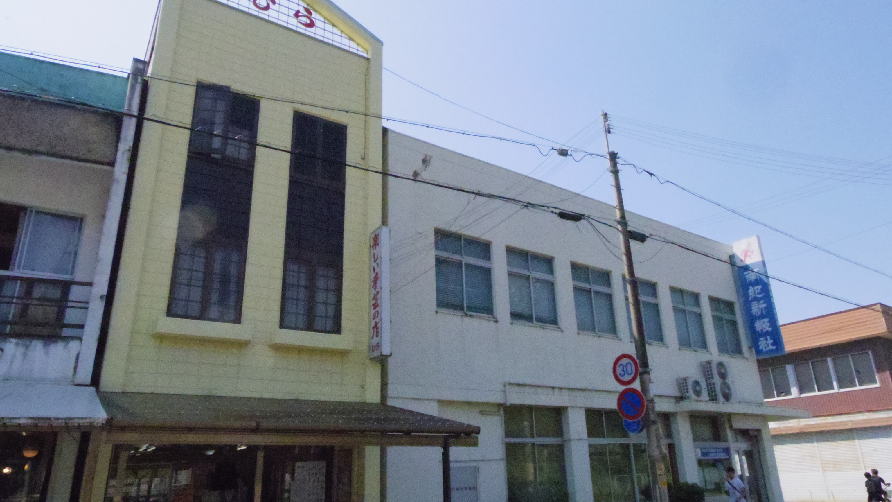 南紀新報社（三重県熊野市）。2015年６月13日、三重県熊野市にて撮影。